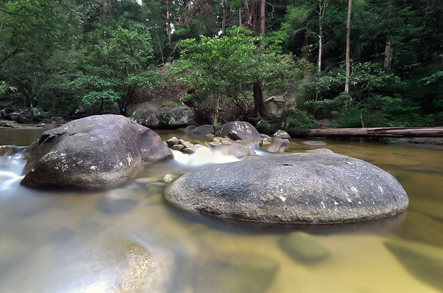 Formasi batu di Gunung Ledang